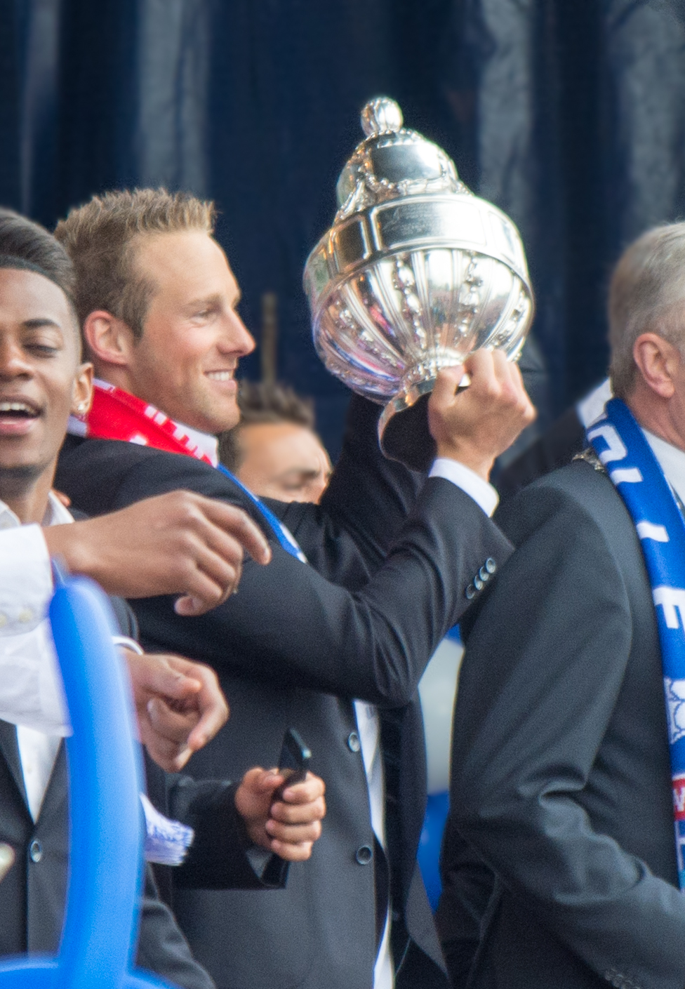 Bart van Hintum tijdens de huldiging van de KNVB beker in 2014